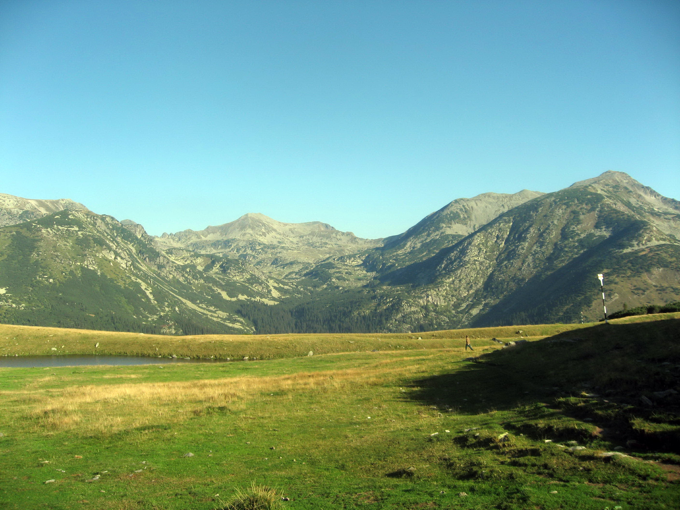 Retezat, pohled na pohoří